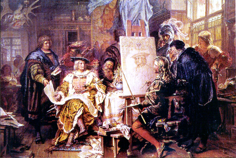 Porträtsitzung in der Werkstatt Albrecht Dürers. Gemälde für das Nürnberger Rathaus von Carl Jäger.